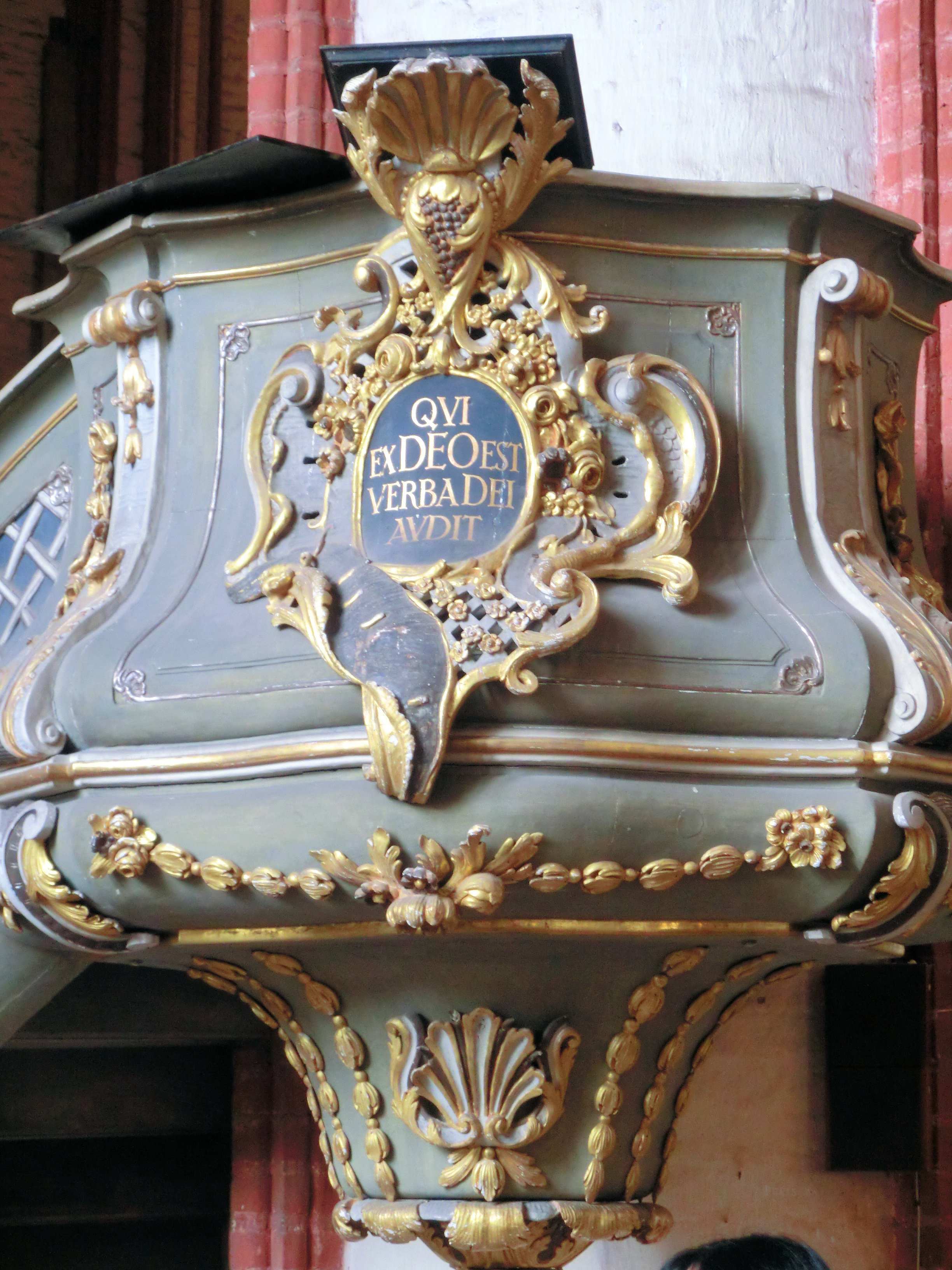 Stendal Dom Kanzel Detail